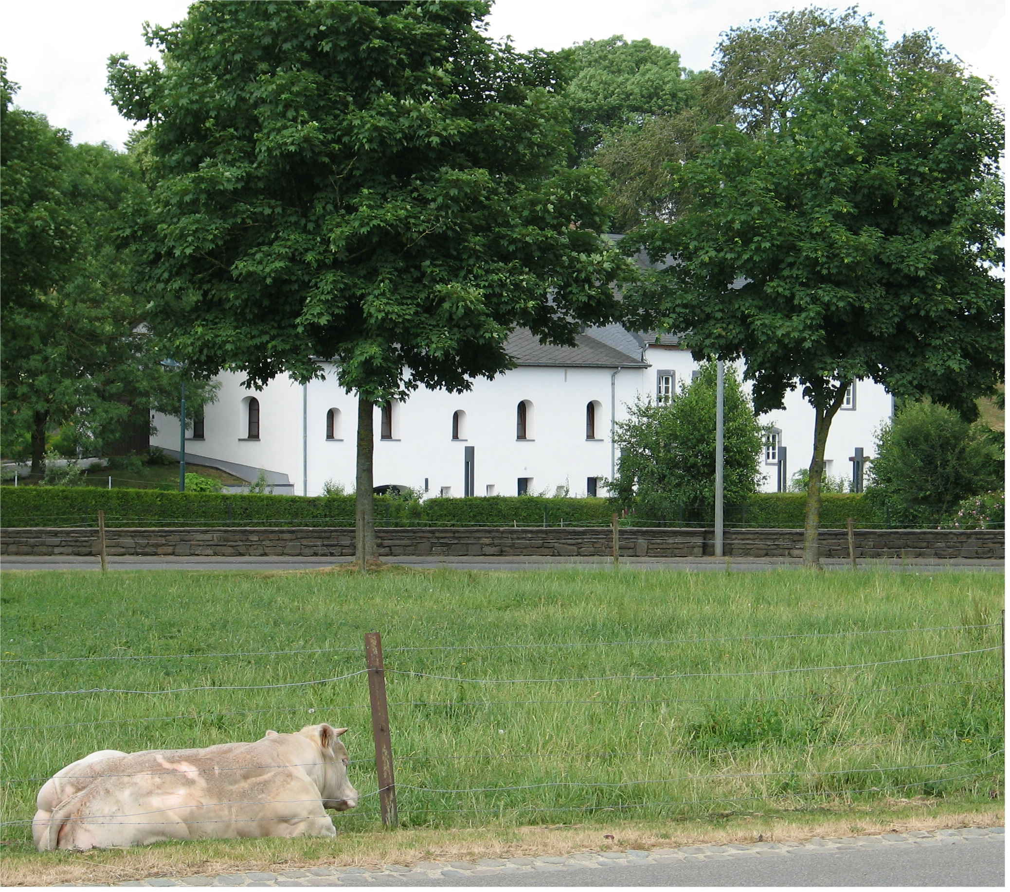 Mëtten am Duerf zu Houfelt.